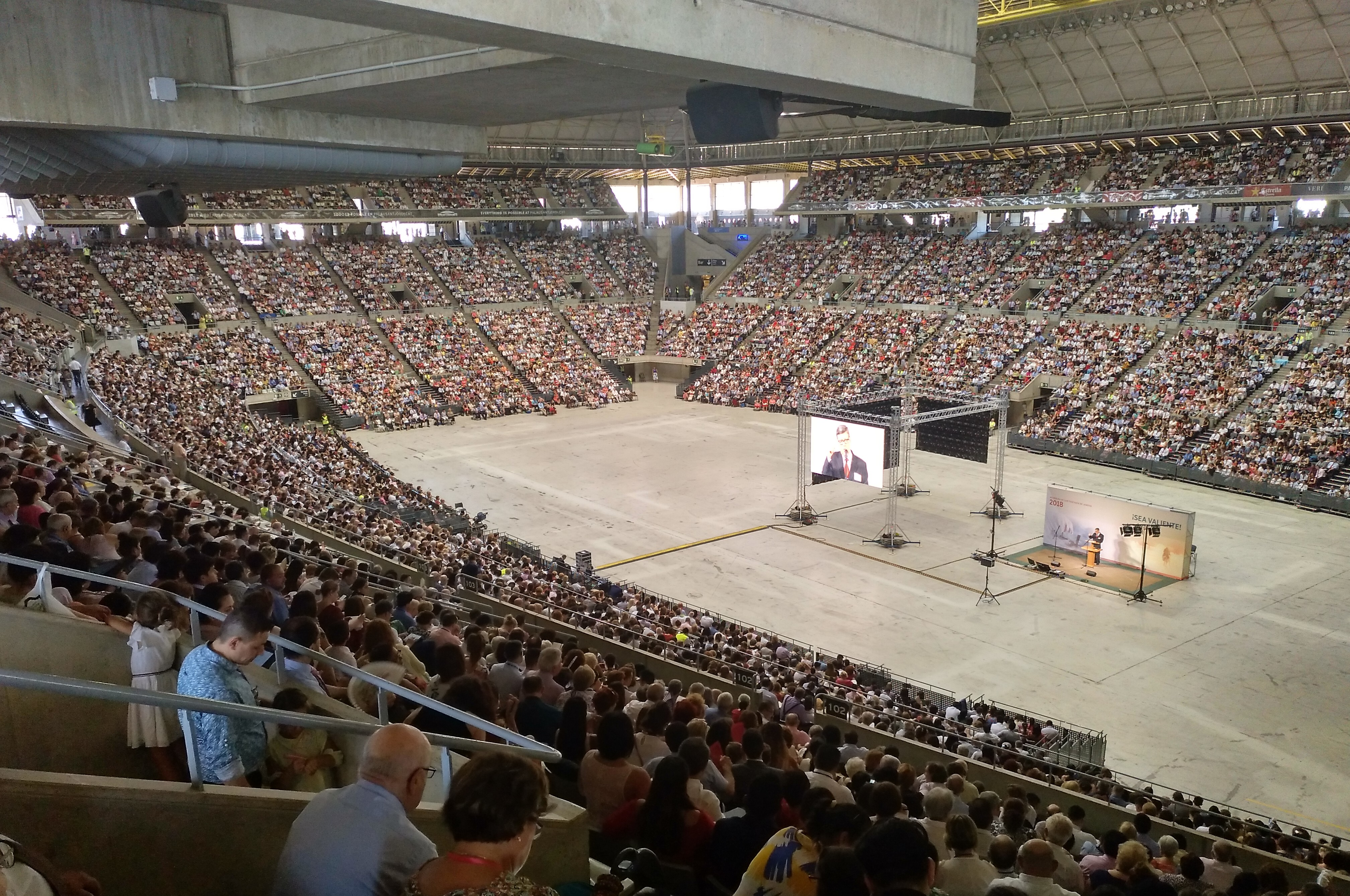 Congrés_Regional_dels_Testimonis_de_Jehovà_l'any_2018_al_Palau_Sant_Jordi_de_Barcelona.jpeg